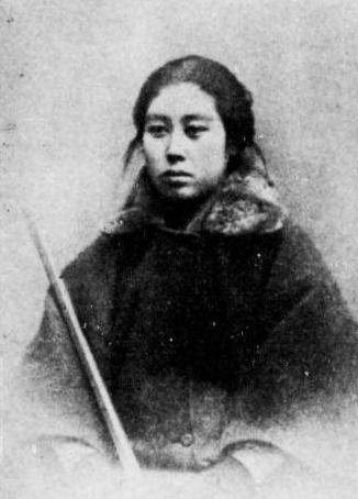 野中千代子